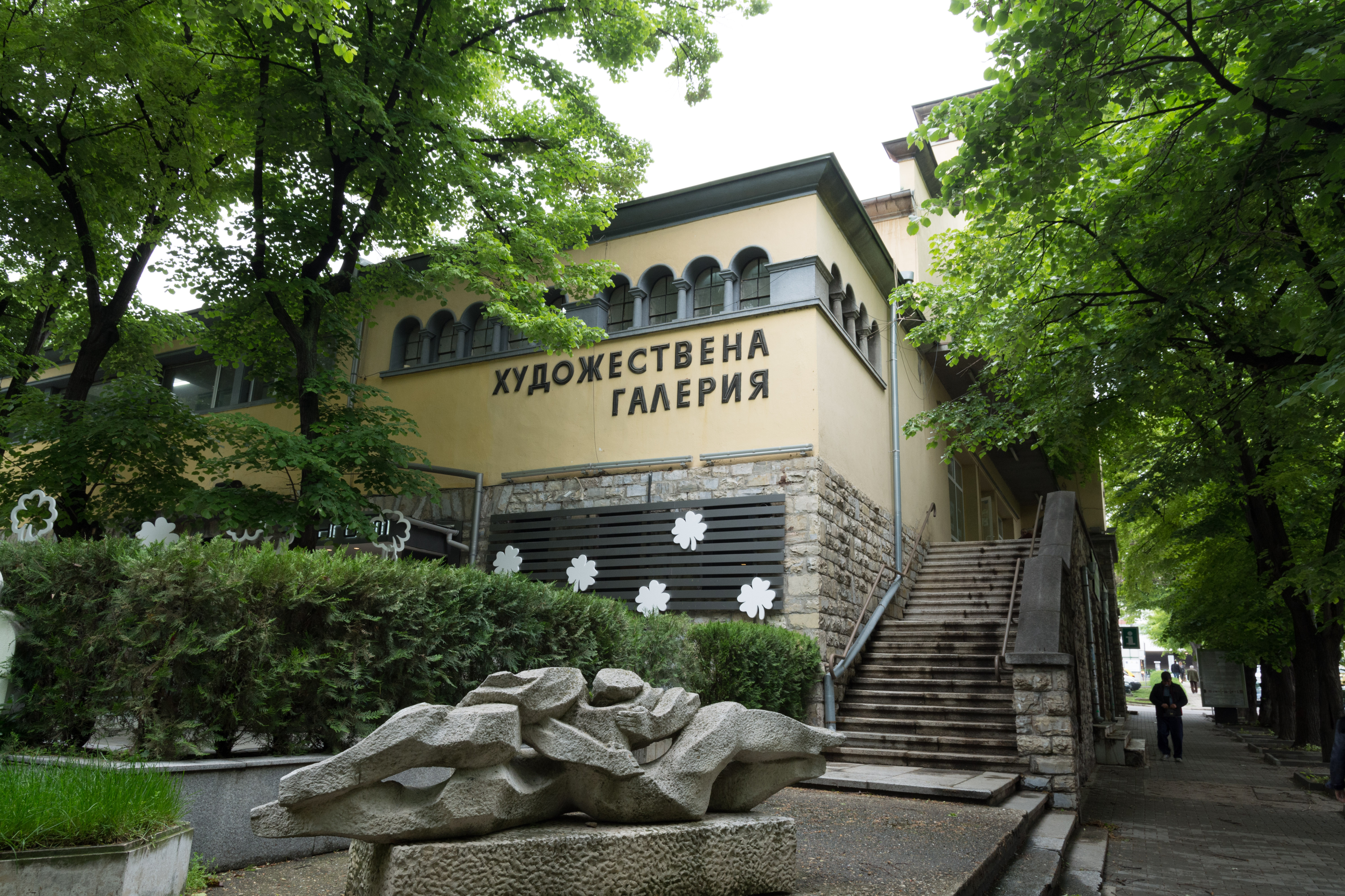 Стара Загора, април 2014